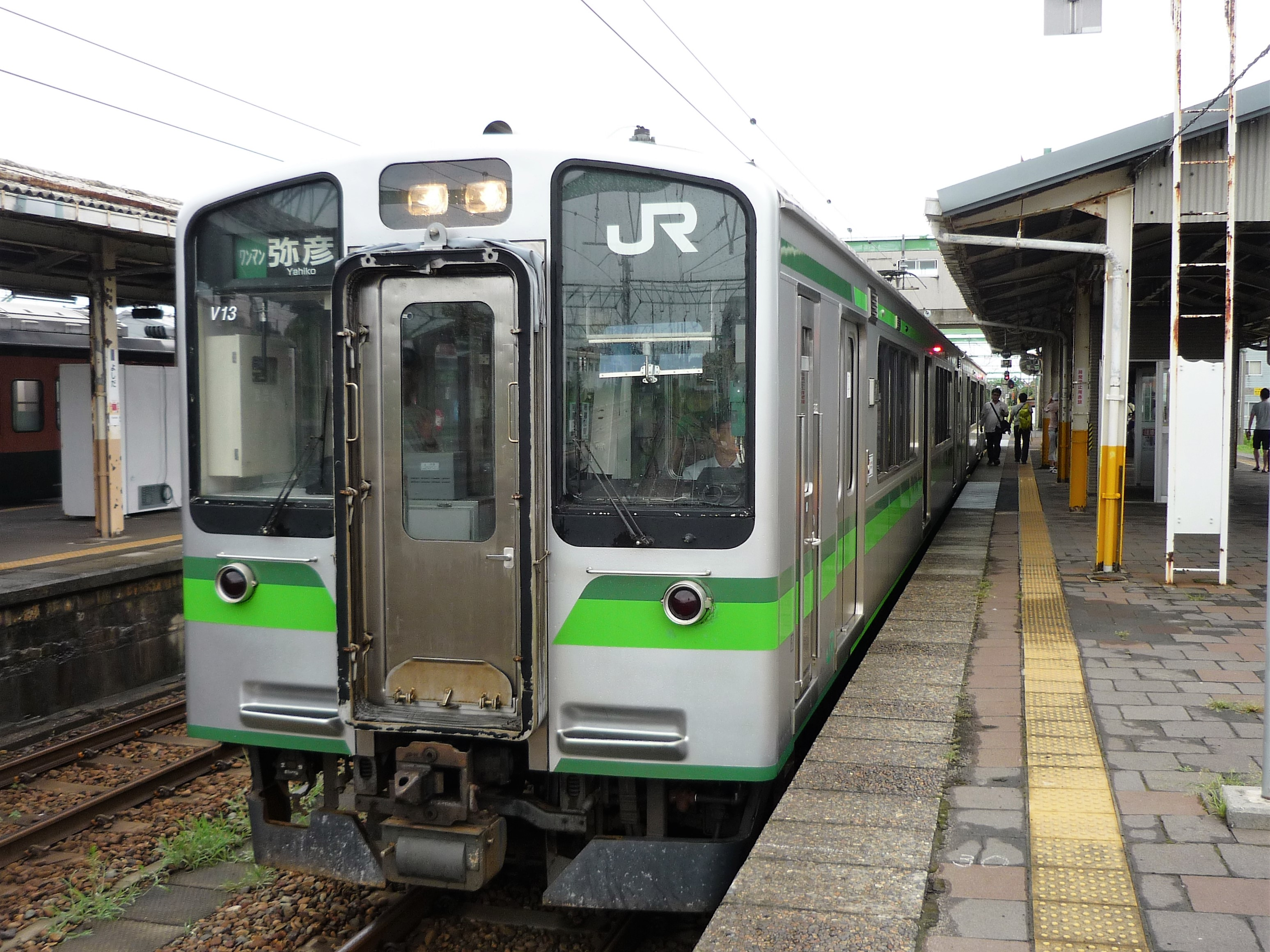 吉田駅4番線に停車中の弥彦線E127系電車 Panasonic Lumix DMC-FS3